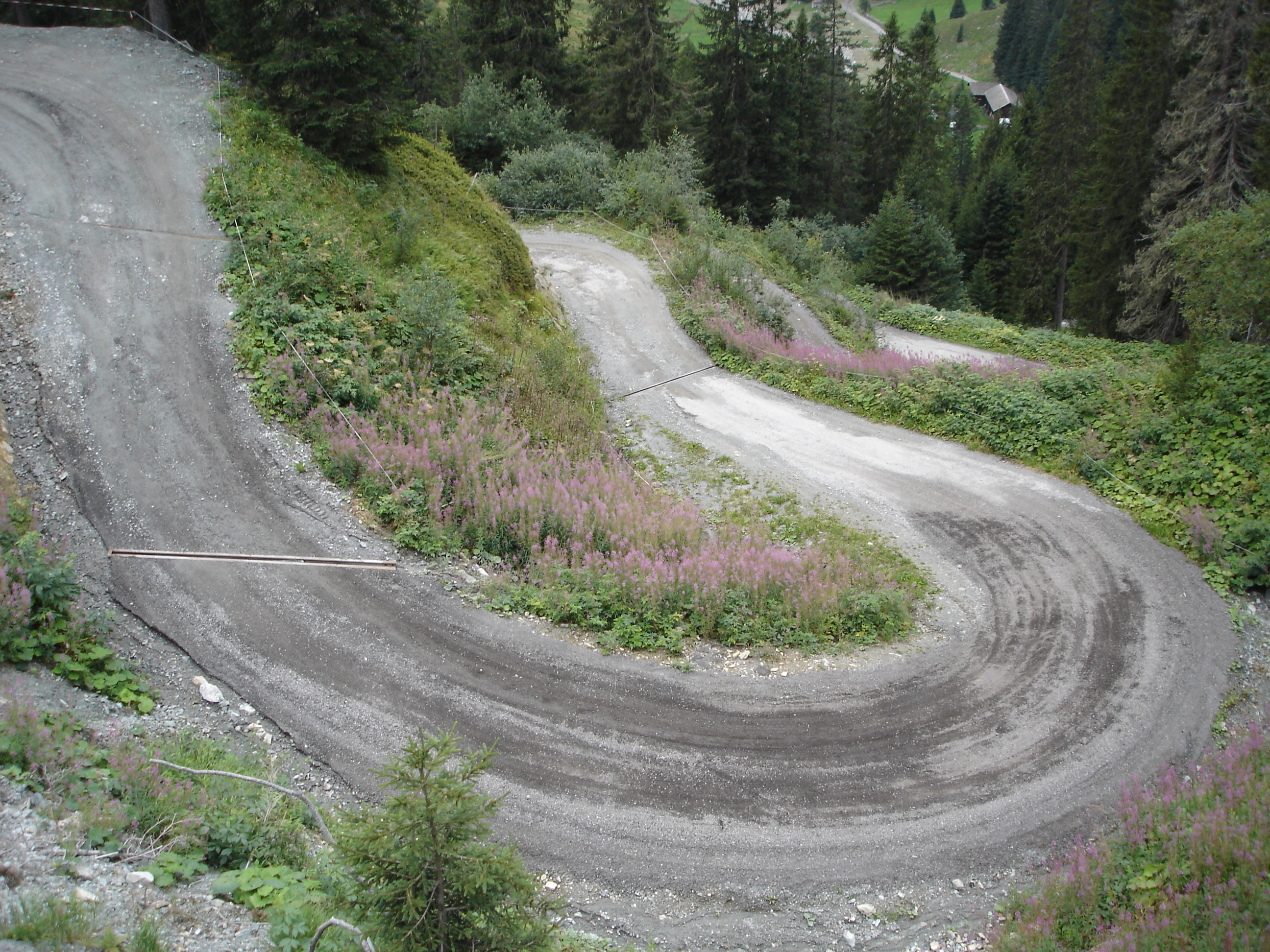 Serpentinen der Schotterstraße von Partenen auf das Zeinisjoch